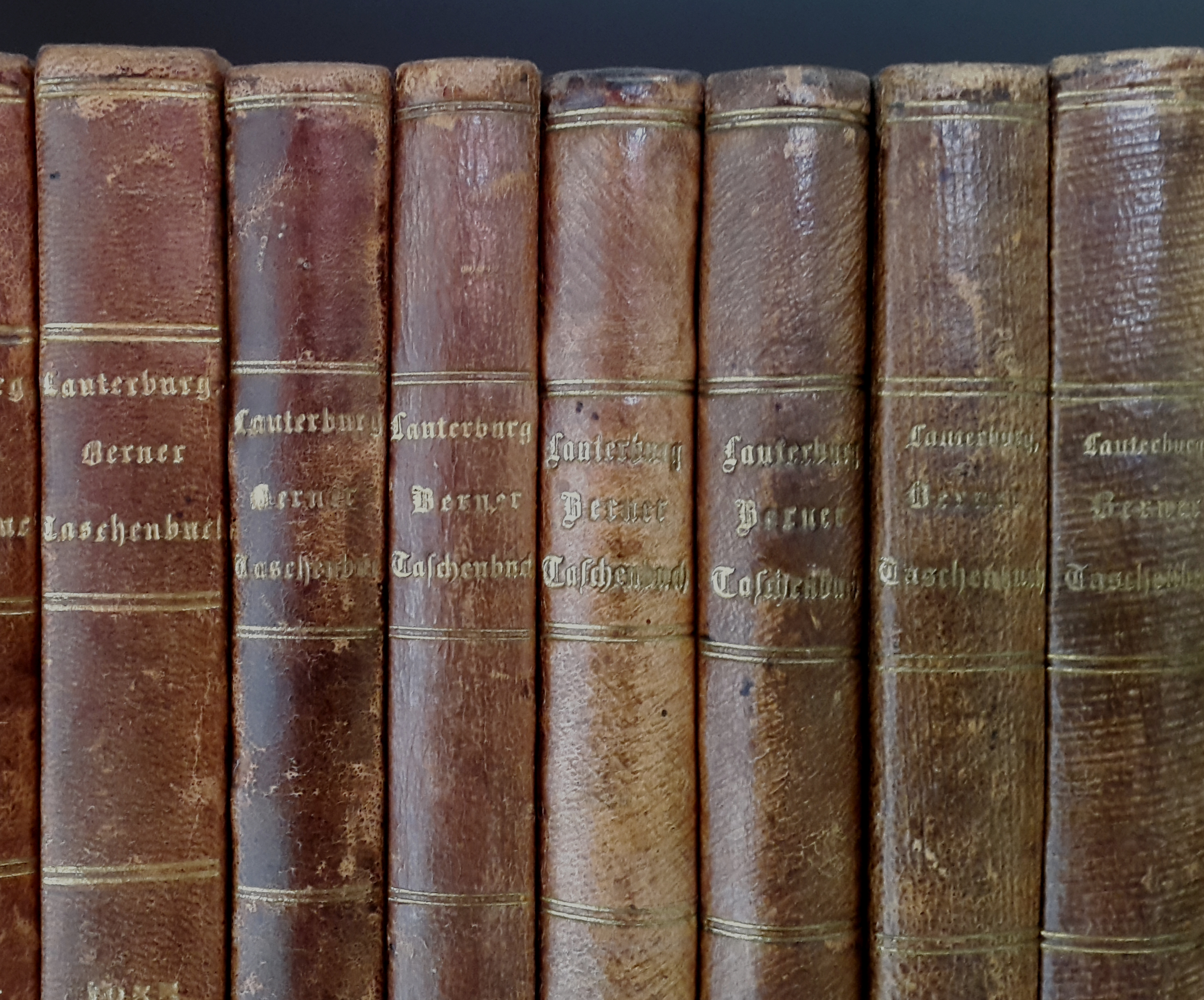 Berner Taschenbuch, Buchrücken.